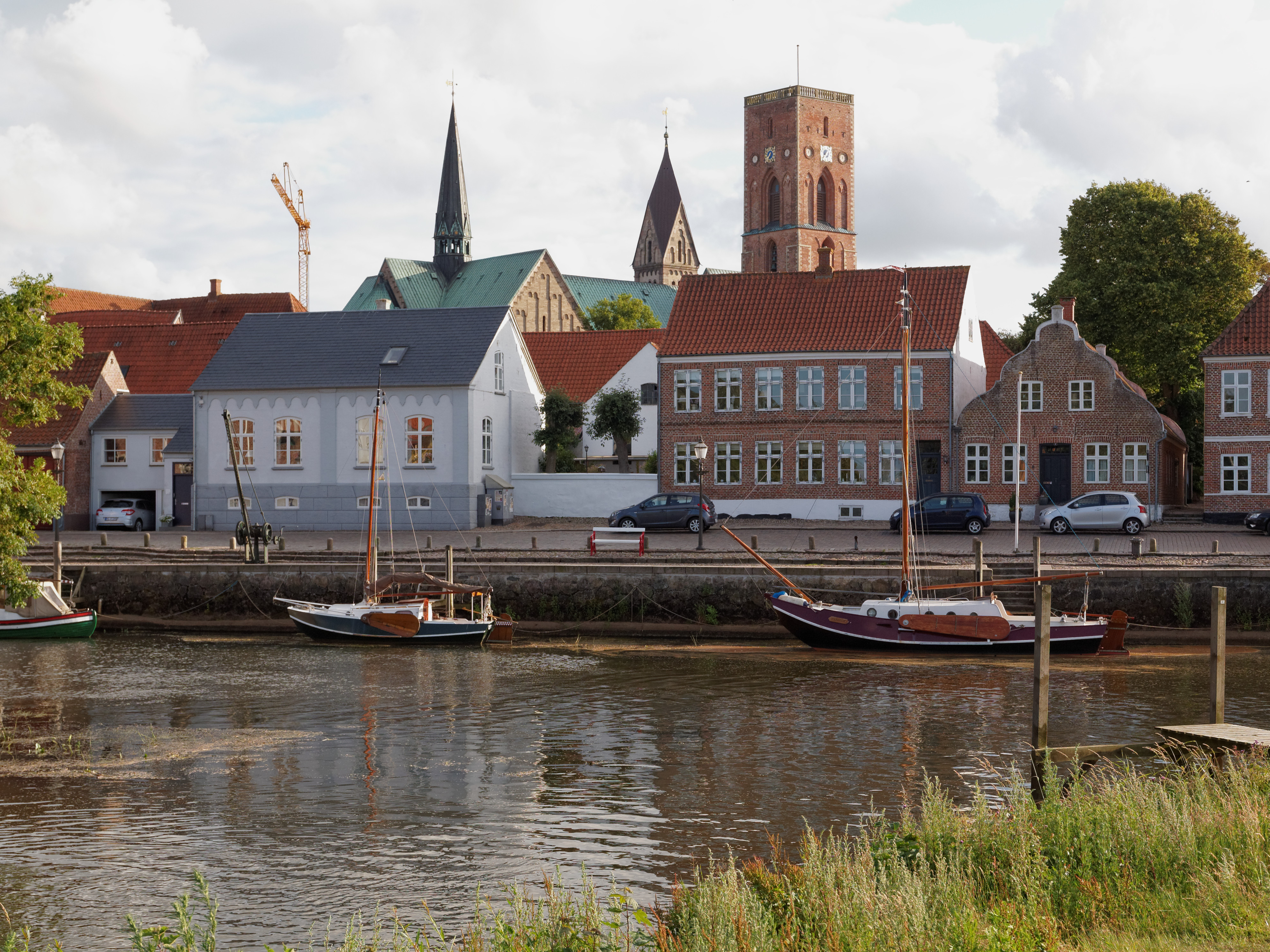 Riebe mit den markanten Türmen des Doms hinter dem Hafen am Ribe A, Jütland, DänemarkDansk: Skibbroen i Ribe set fra Hovedengen